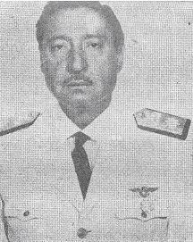 Hermes Quijada, marino de la Armada Argentina.